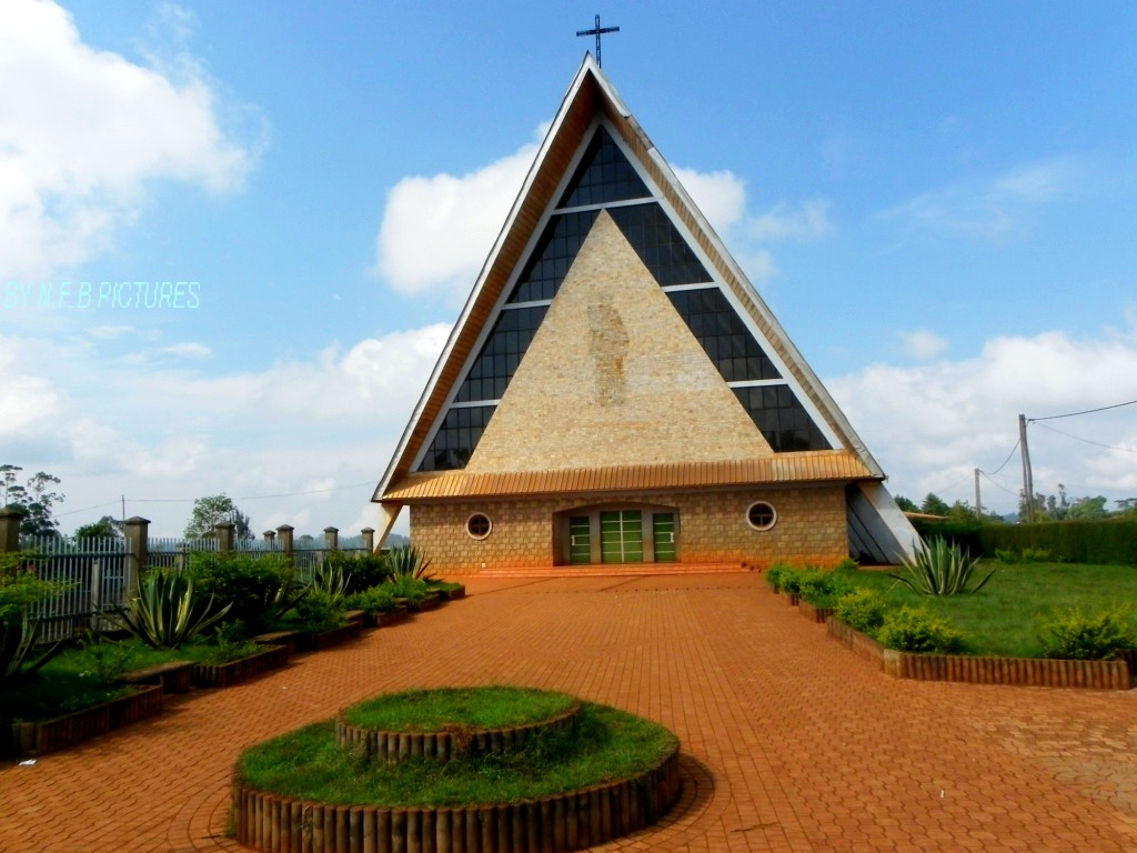 Chapelle catholique de BAMENDJOU